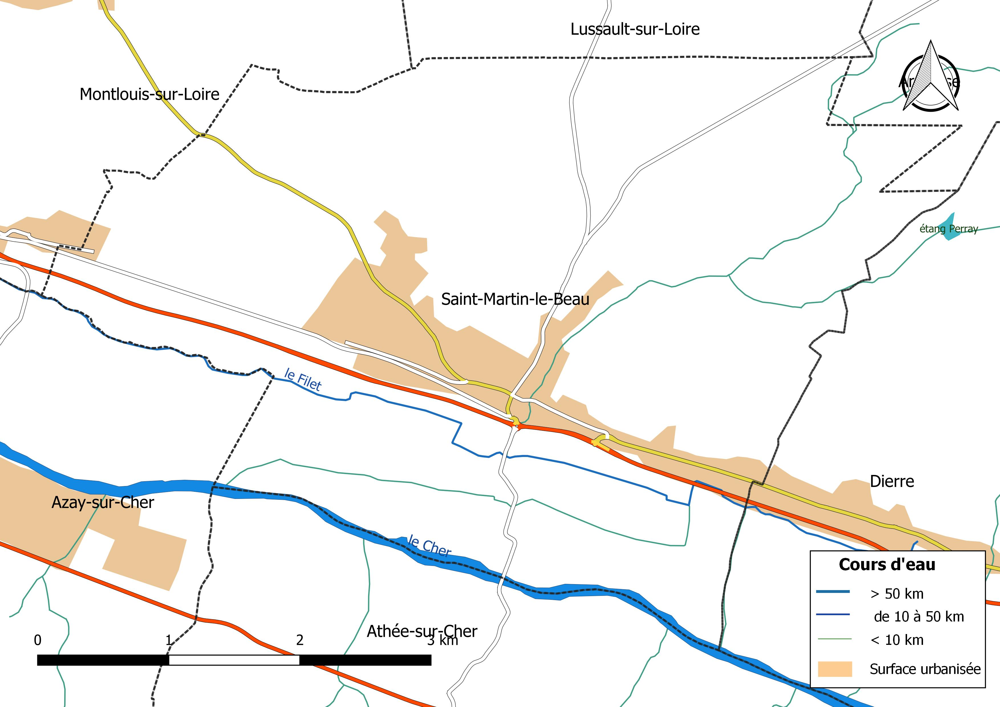 Carte du réseau hydrographique de la commune de Saint-Martin-le-Beau (France).